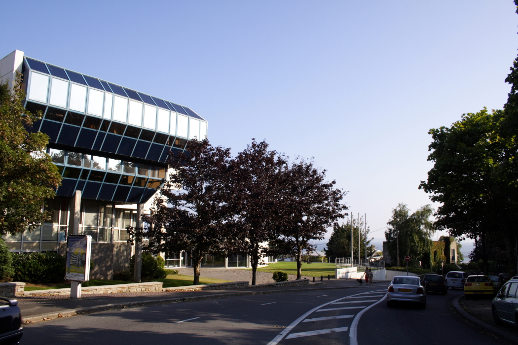 Patrimoine du Finistère